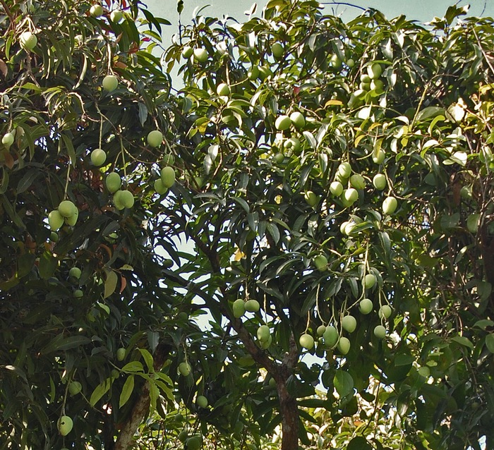 Mangifera laurina, unripe fruits. Palabuhanratu, West Java, Indonesia